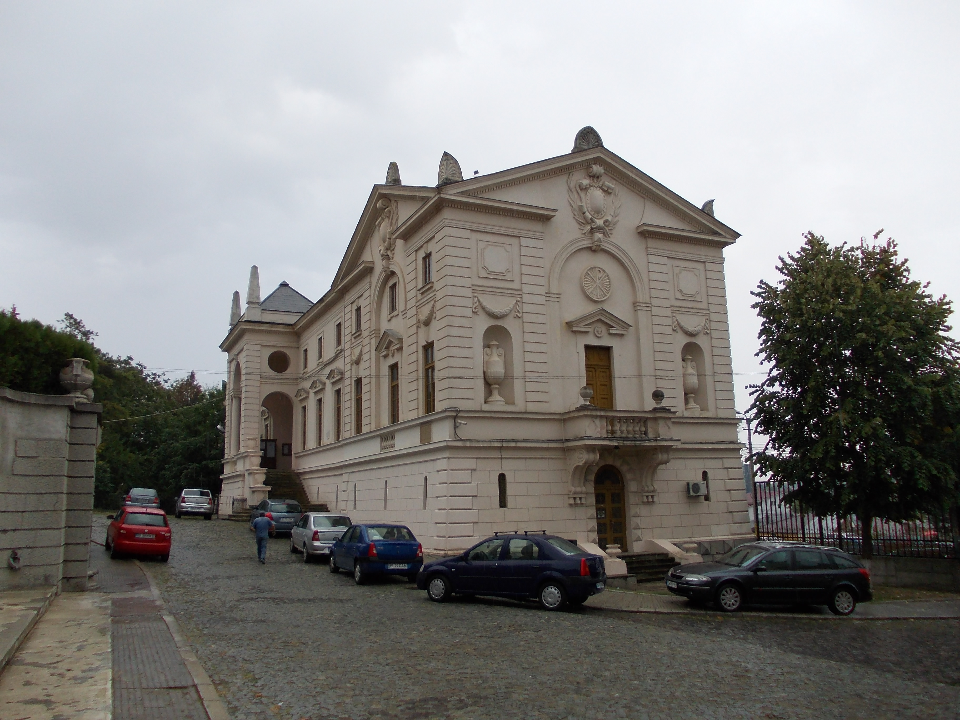 Trei clădiri administrative 04